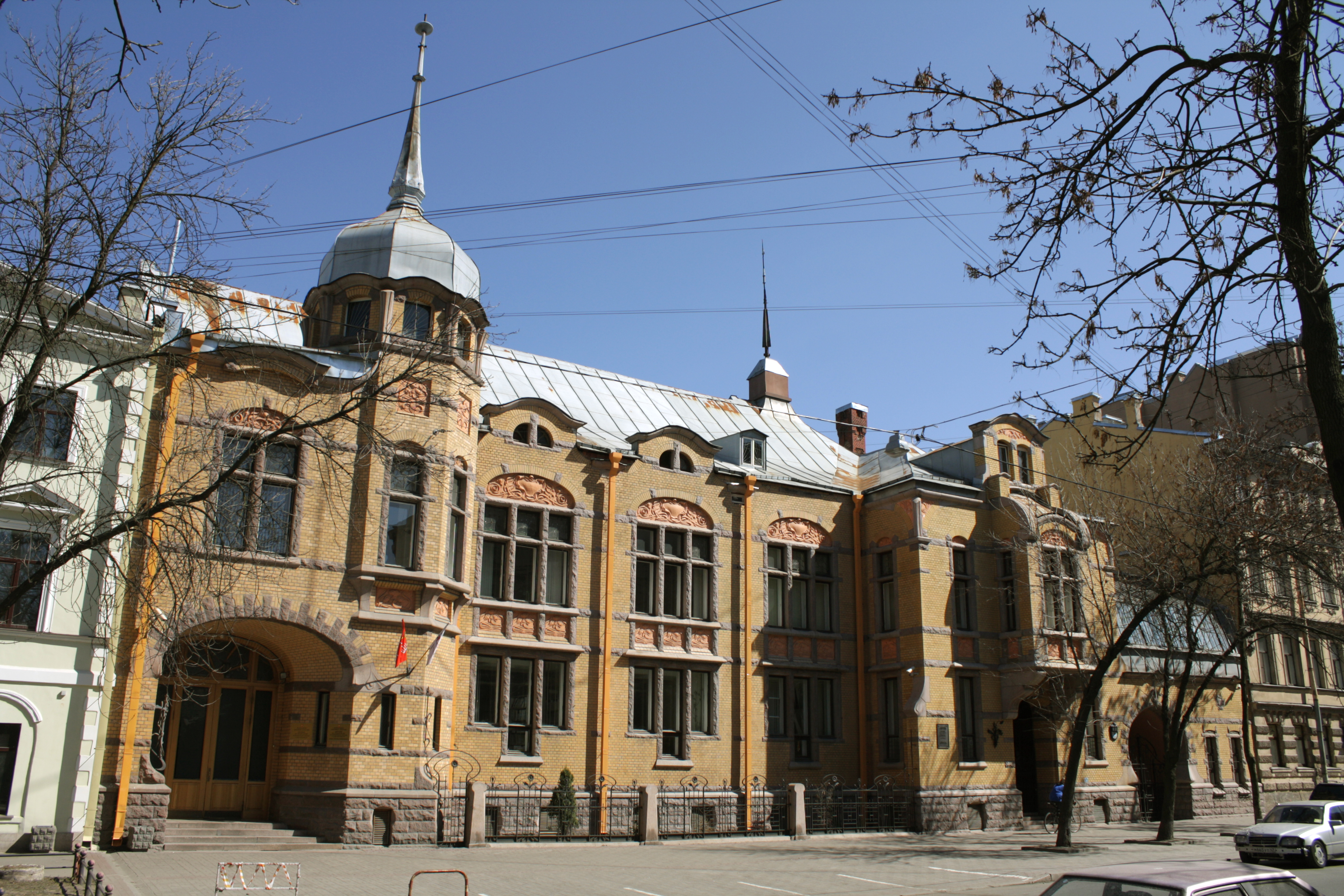 Санкт-Петербург. 4-я линия В. О., 9. Особняк и контора П. П. Форостовского. 1900—1901. Архитектор Карл Шмидт